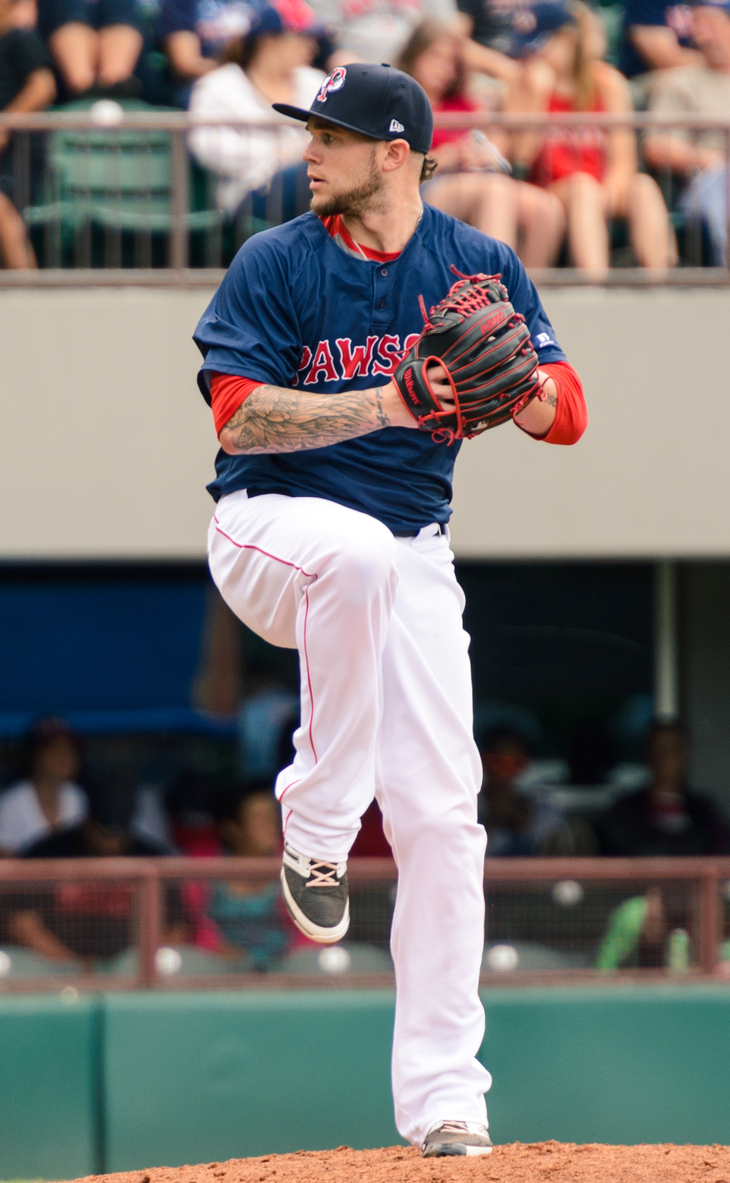 Drake Britton